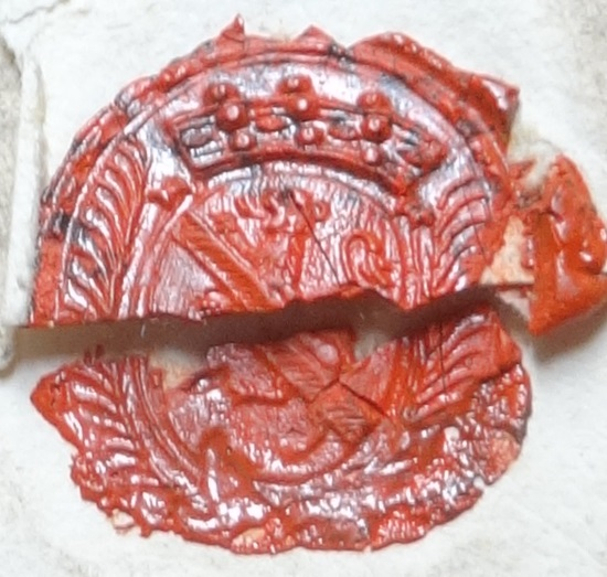 Sceau de cire aux armes des Menthon-Lornay apposé sur un courrier de 1717 de Jean-Antoine de Menthon (1697-1778), baron de Lornay, à Jean-Baptiste de Menthon (1651-1722), baron de Gruffy / Famille de Menthon, Savoie, France